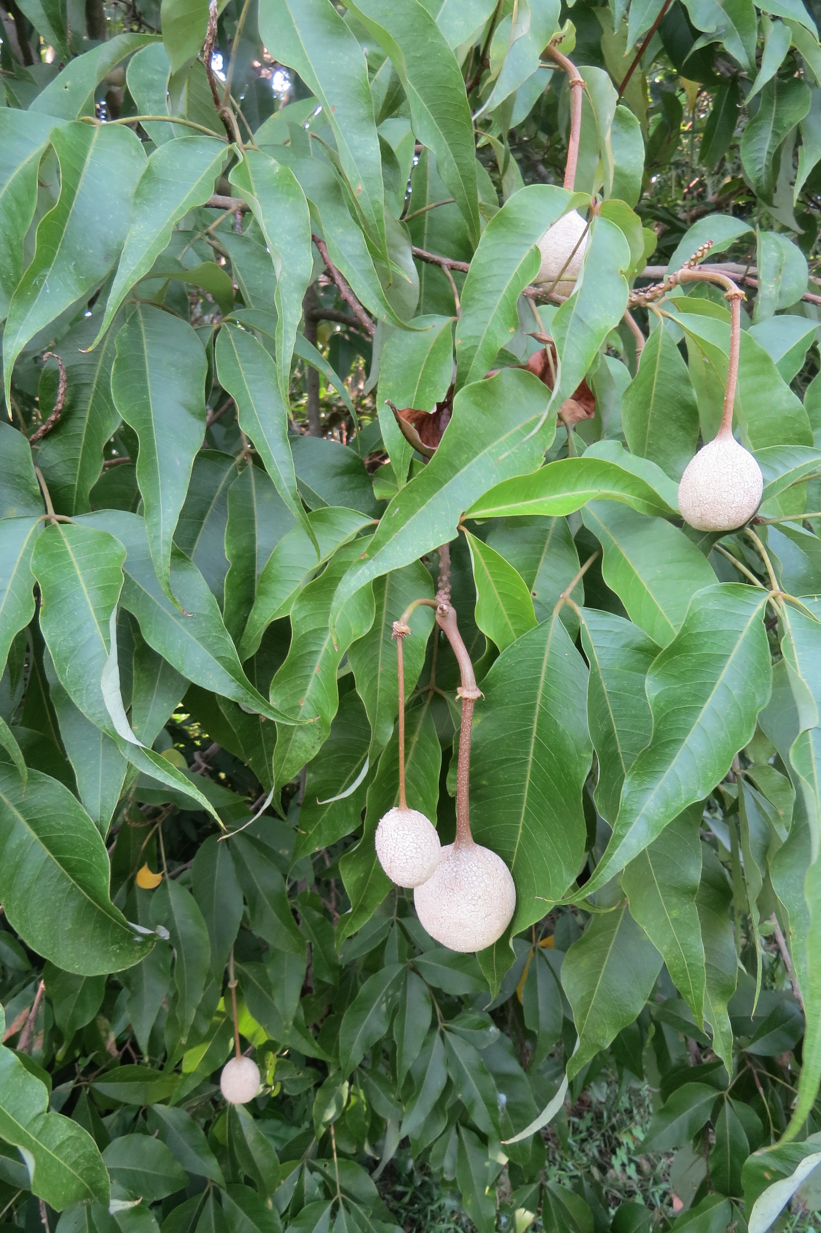 Photos by Vinayaraj